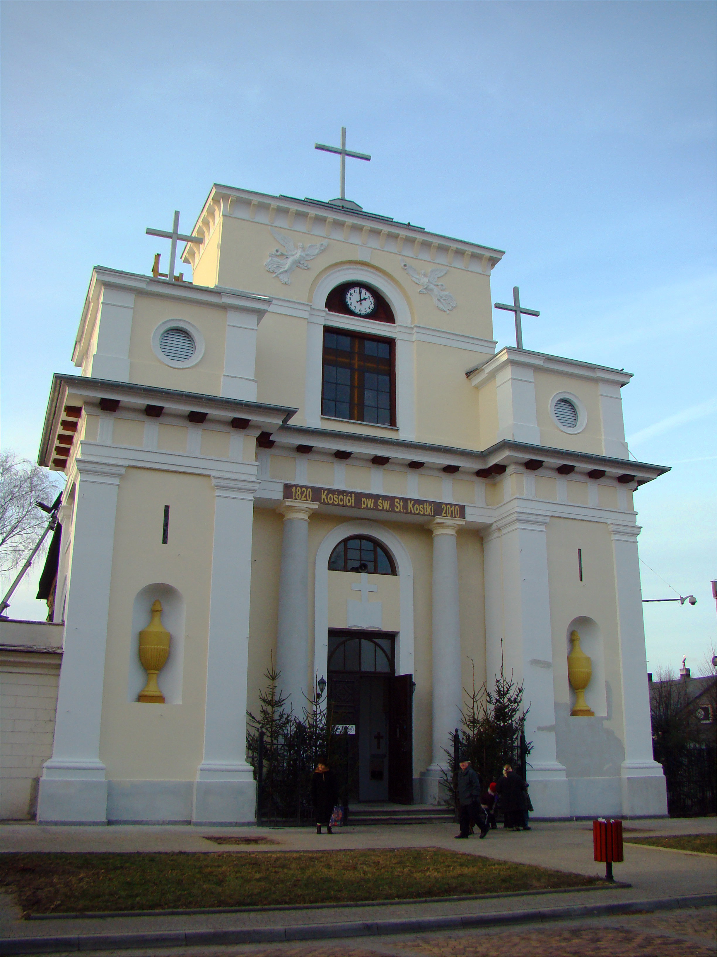 Kościół pw. św. Stanisława Kostki / Kościół Ewangelicko - Augsburski w Aleksandrowie Łódzkim (powiat zgierski, województwo łódzkie), Polska